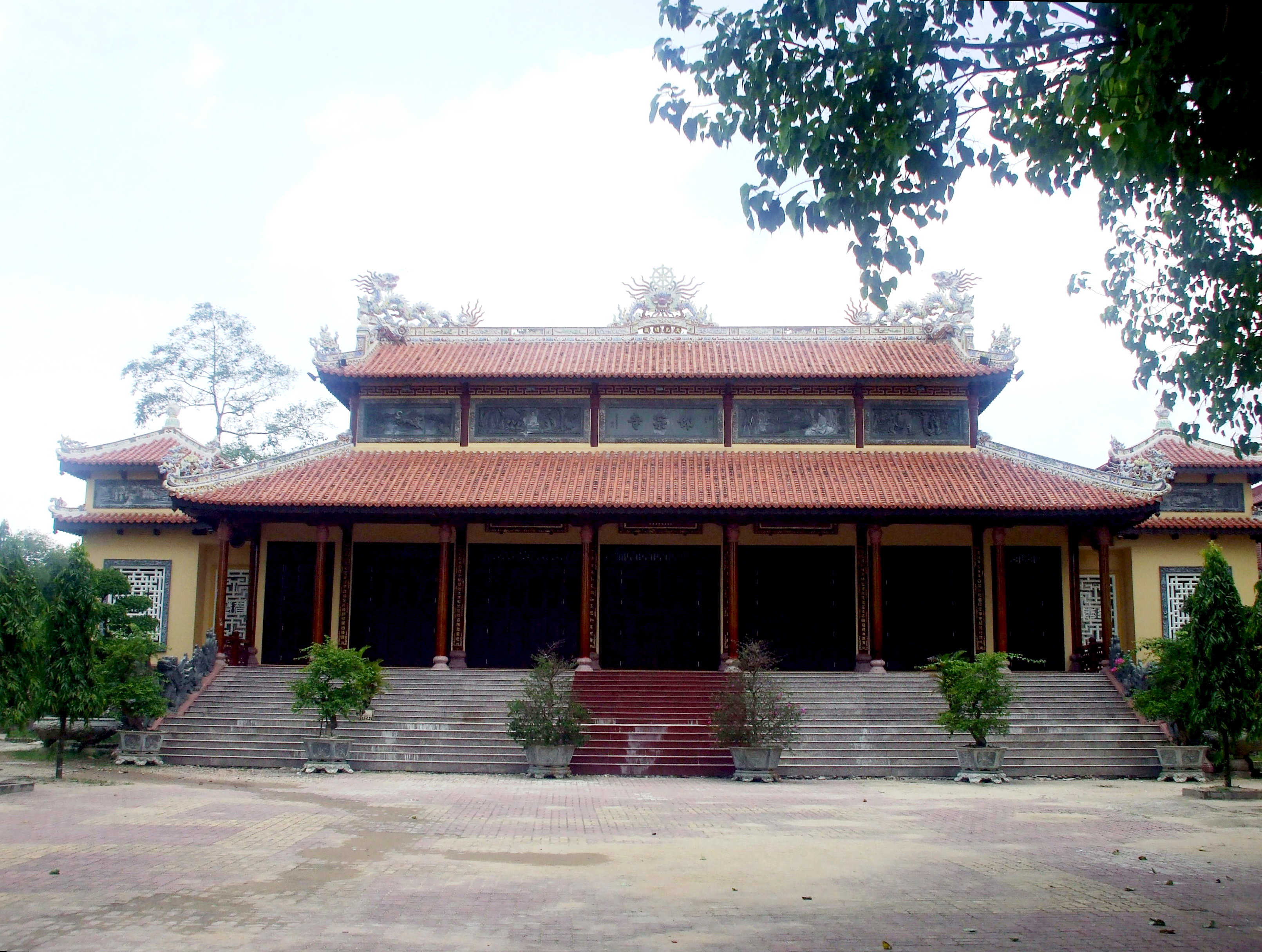 Chùa Từ Đàm là một danh lam, hiện tọa lạc tại số 1 đường Sư Liễu Quán; thuộc phường Trường An, thành phố Huế, tỉnh Thừa Thiên-Huế, Việt Nam.